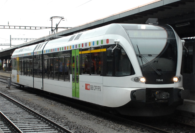 GTW 735-6, Thurbo te Romanshorn.